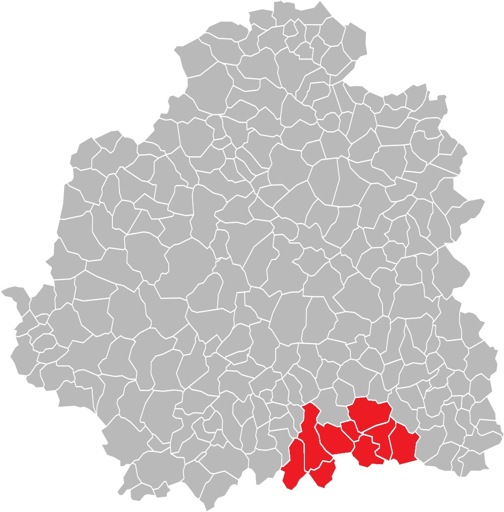 Carte des communes de l'Indre (36) : Le canton d'Aigurande, de 1790 à 2015.